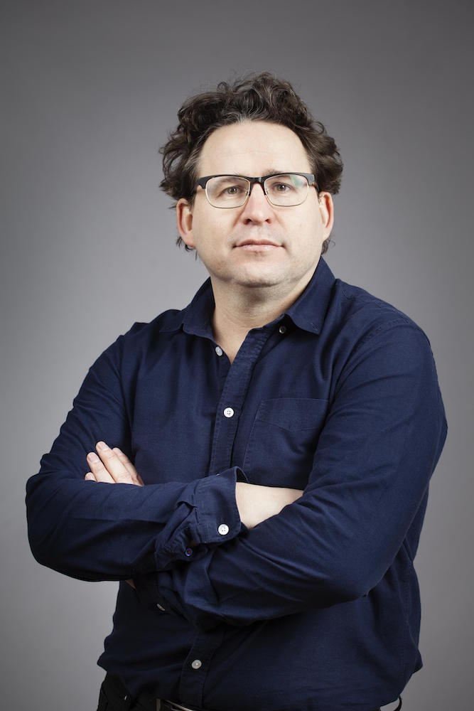 Foto von Wolfram Eilenberger